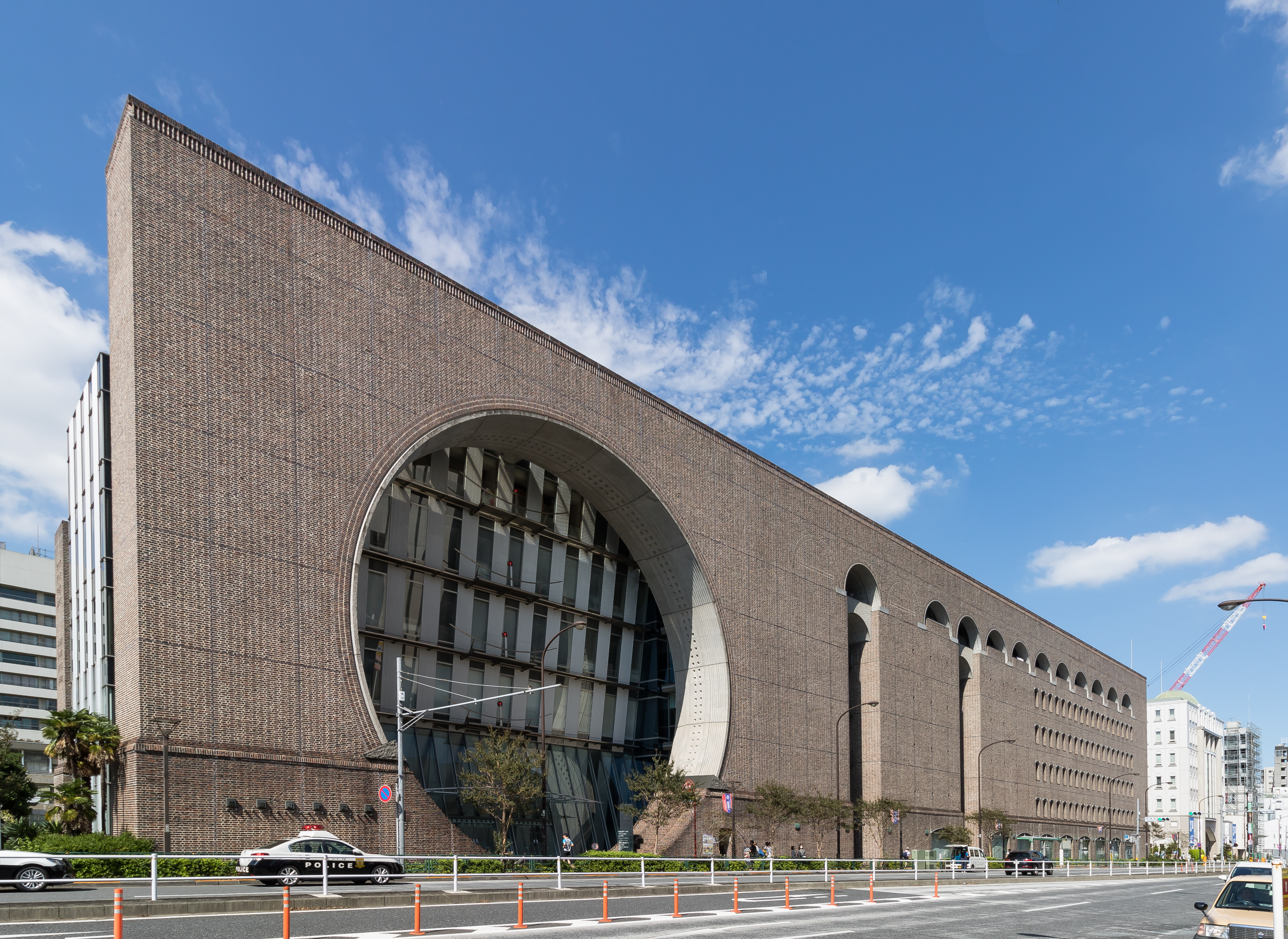 慶応大学信濃町キャンパスの敷地に建つ煉瓦館（東京都新宿区）